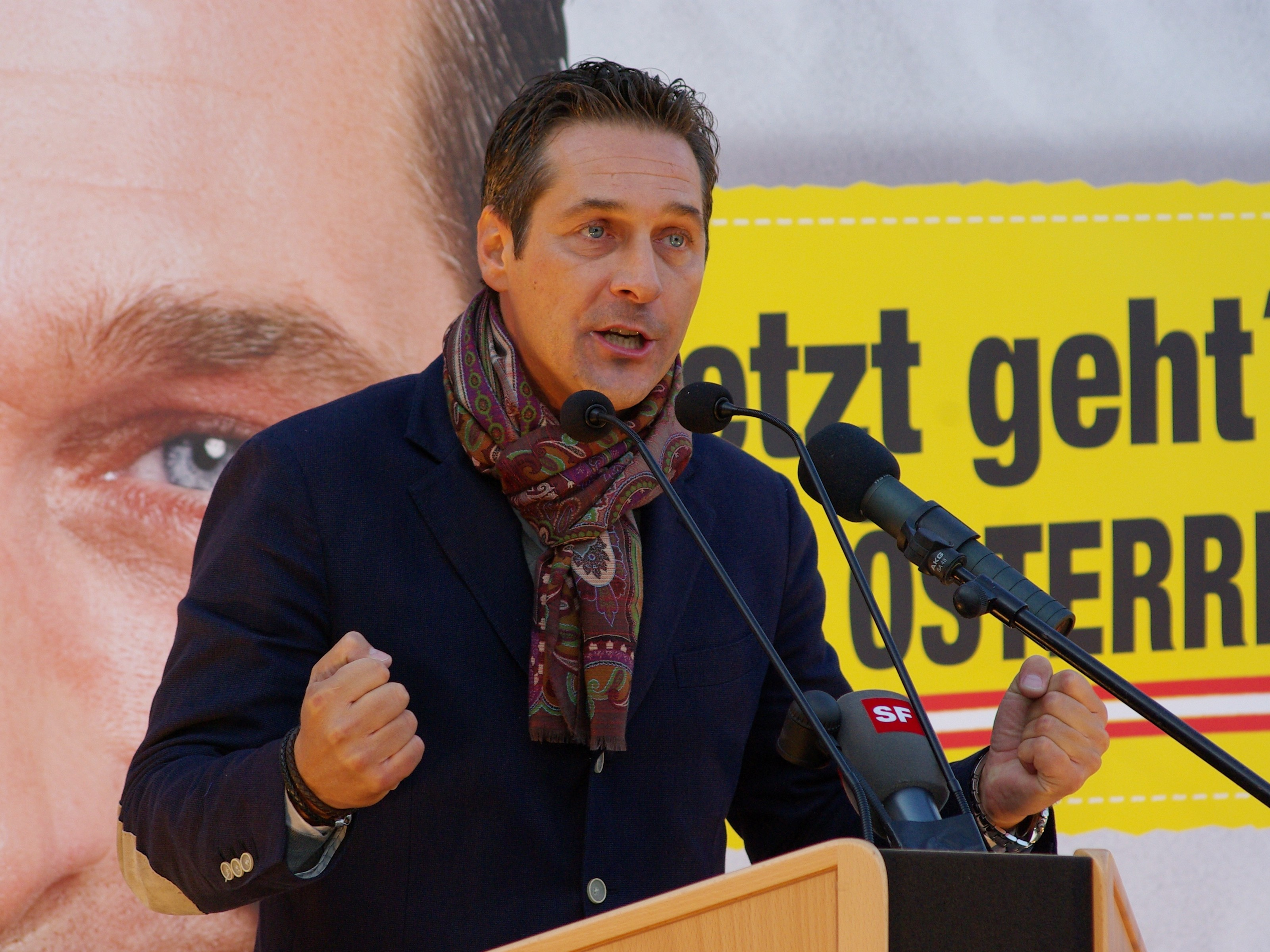 Der österreichische Politiker Heinz-Christian Strache bei einer Wahlkampfveranstaltung der FPÖ am 18. September 2008 in Sankt Pölten.